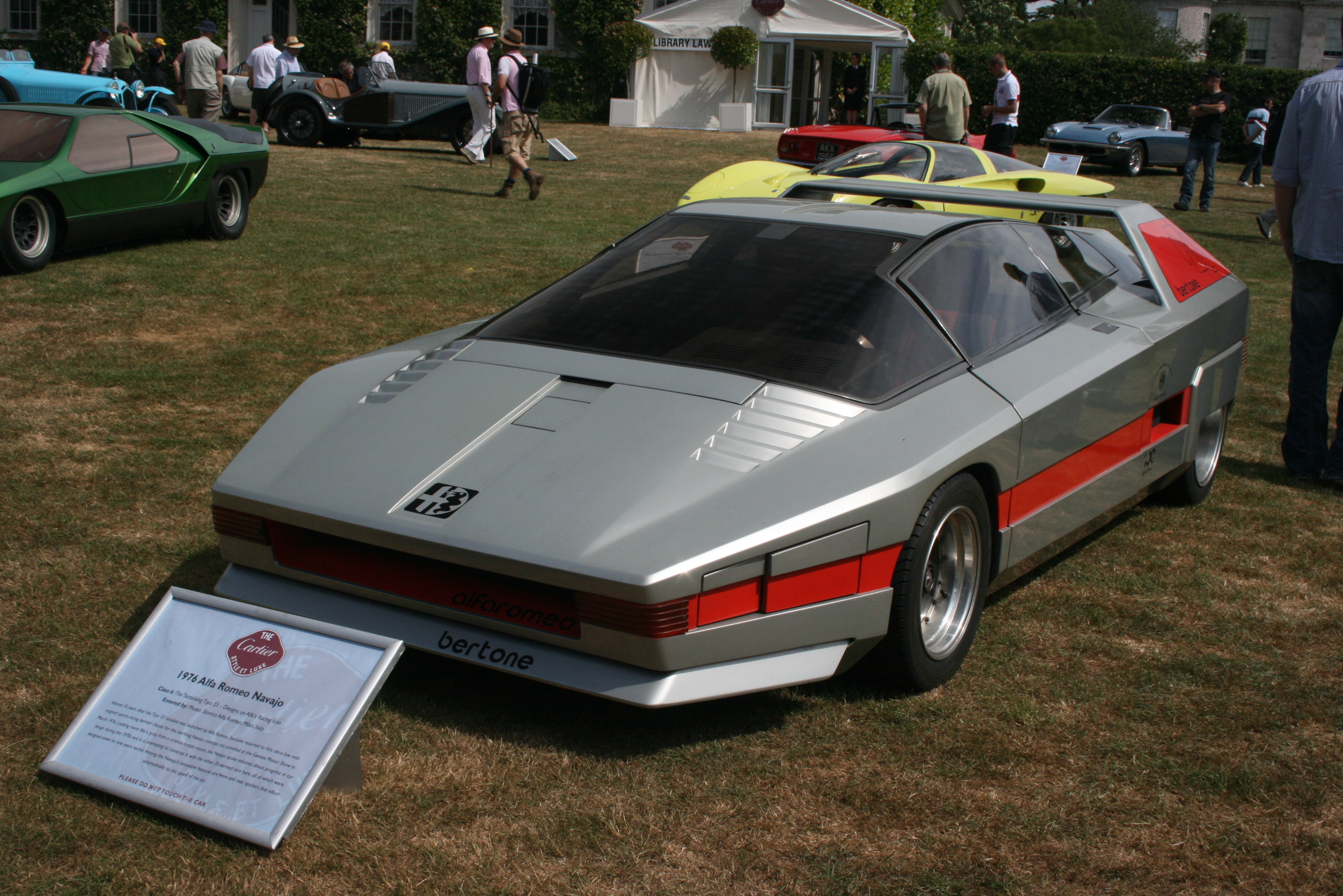 1976 Alfa Romeo Navajo